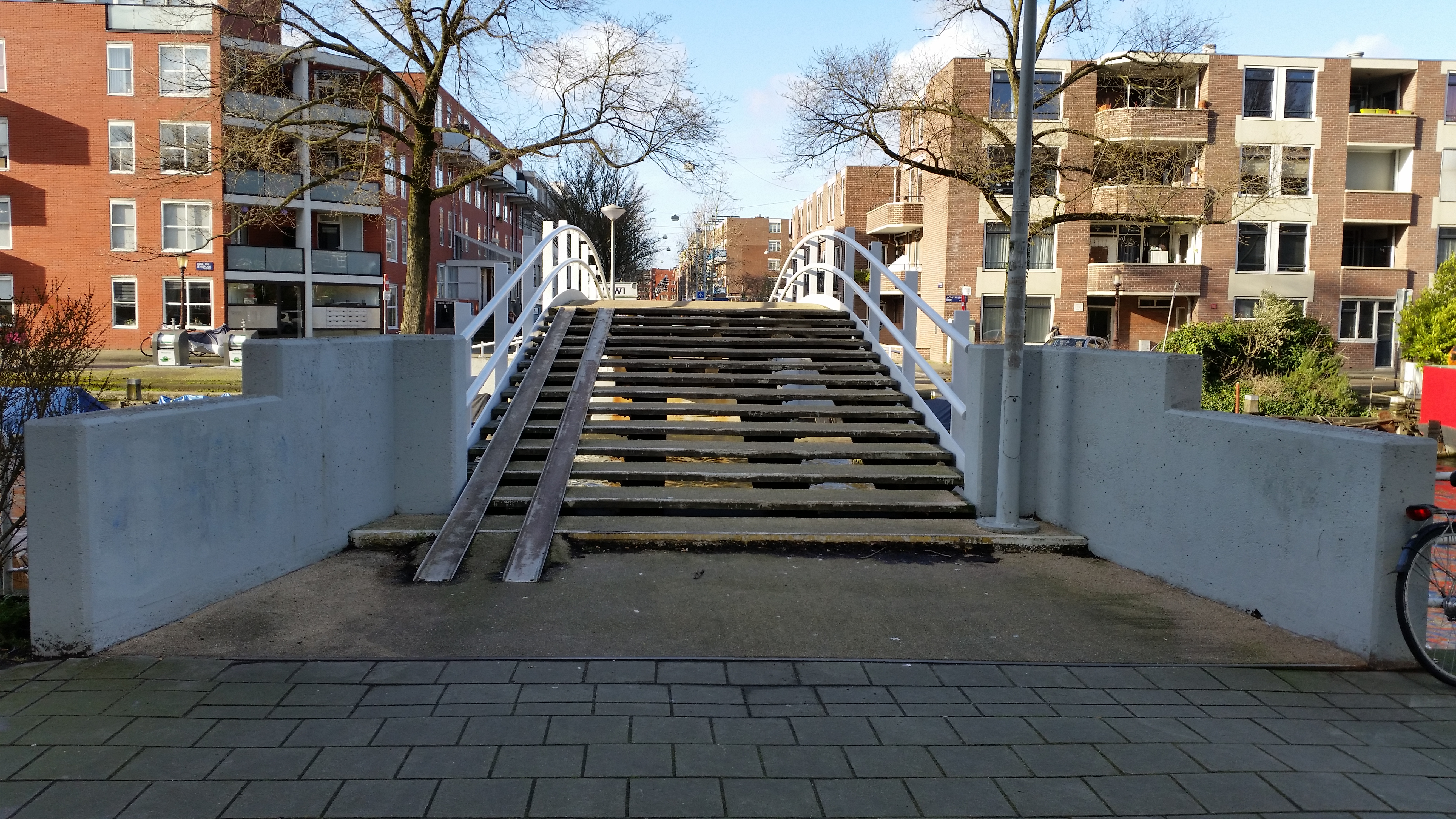 Overzichtsfoto nar het noorden van Brug 1923, Ketelhuisbrug